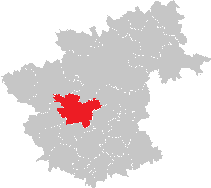 Bezirk Zwettl